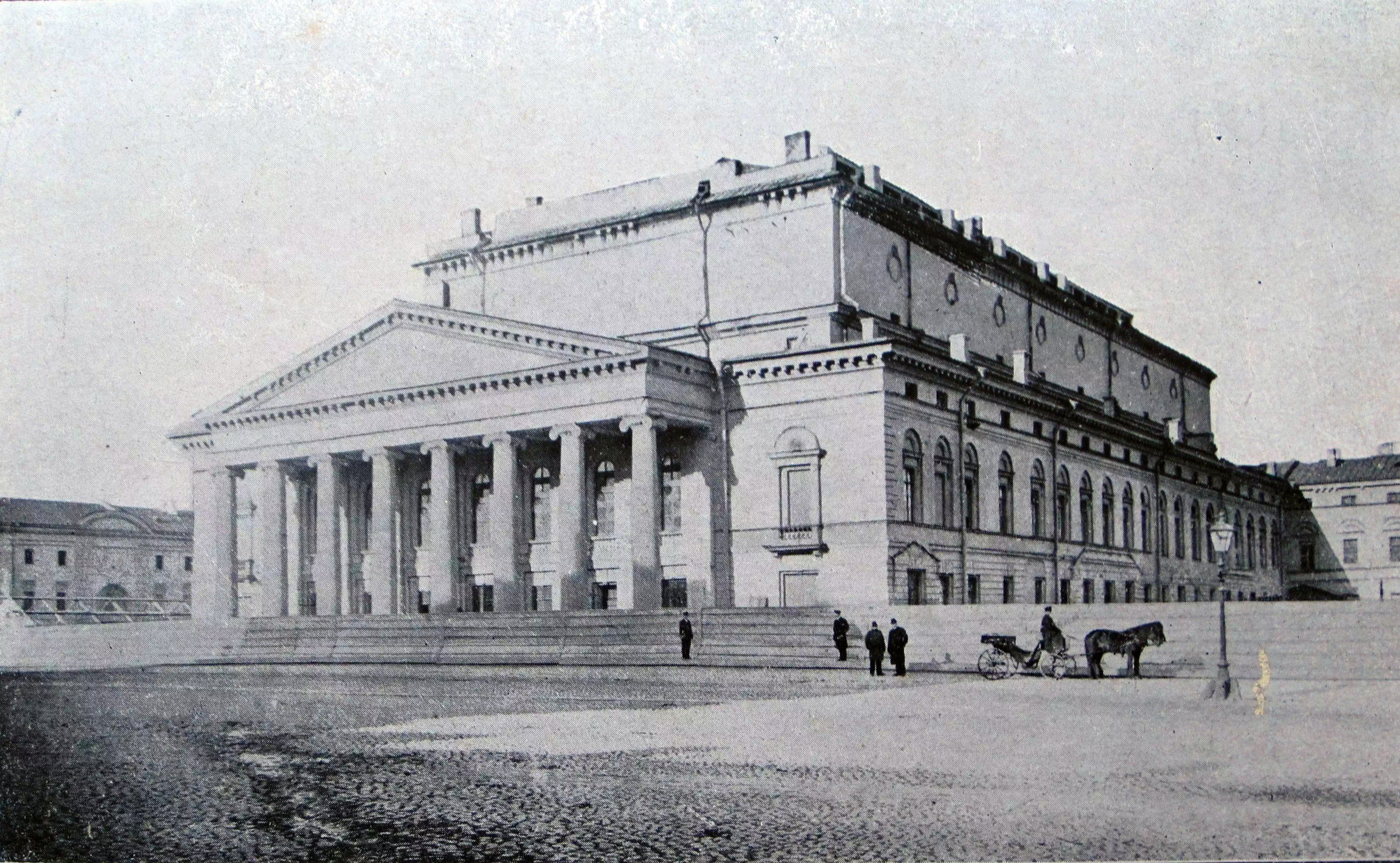 Вид Большого / Каменного театра в Санкт-Петербурге перед сносом в 1886 г.